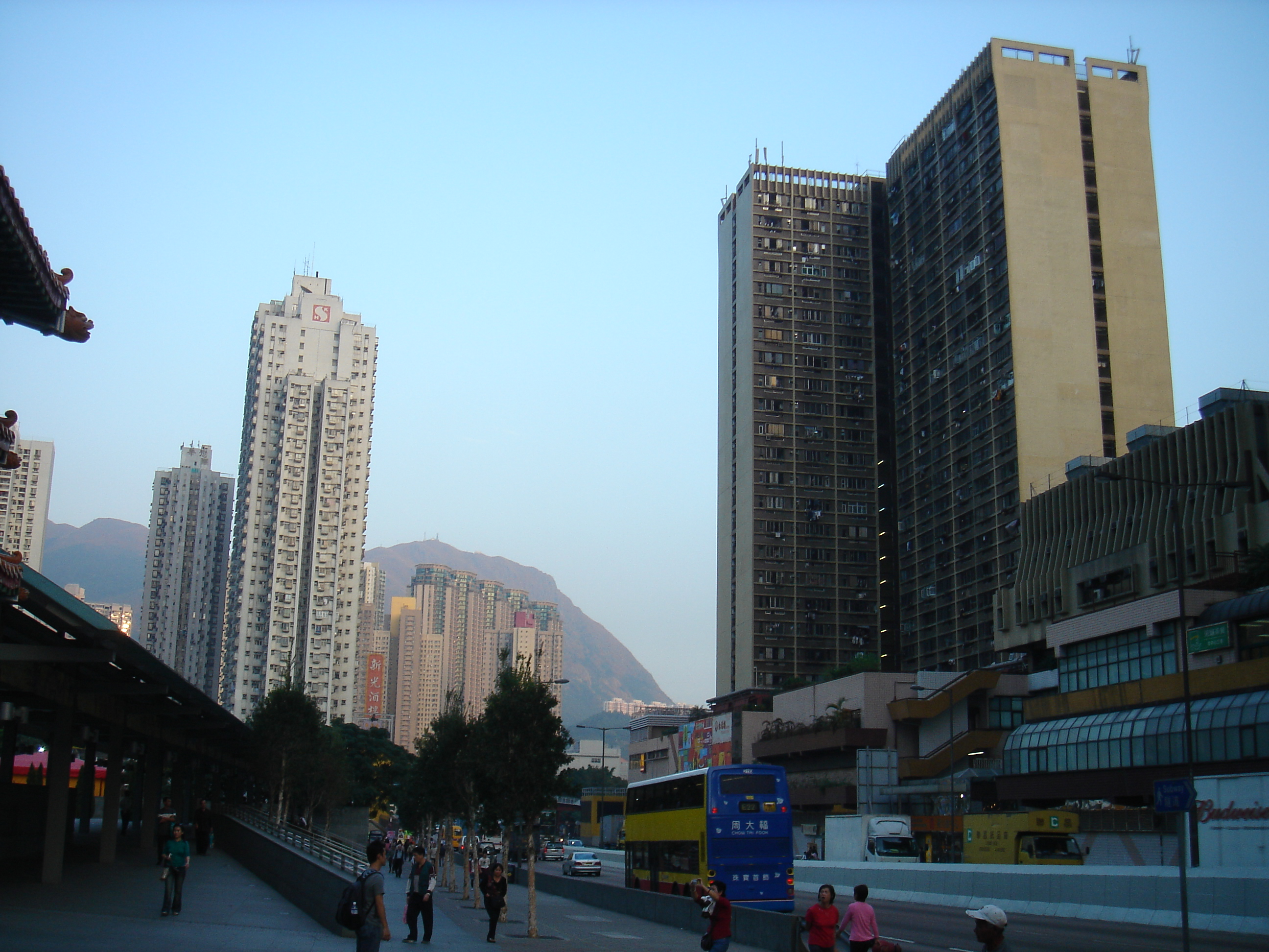 Lung Cheung Road, Wong Tai Sin, Kowloon, Hong Kong, outside the MTR Station.